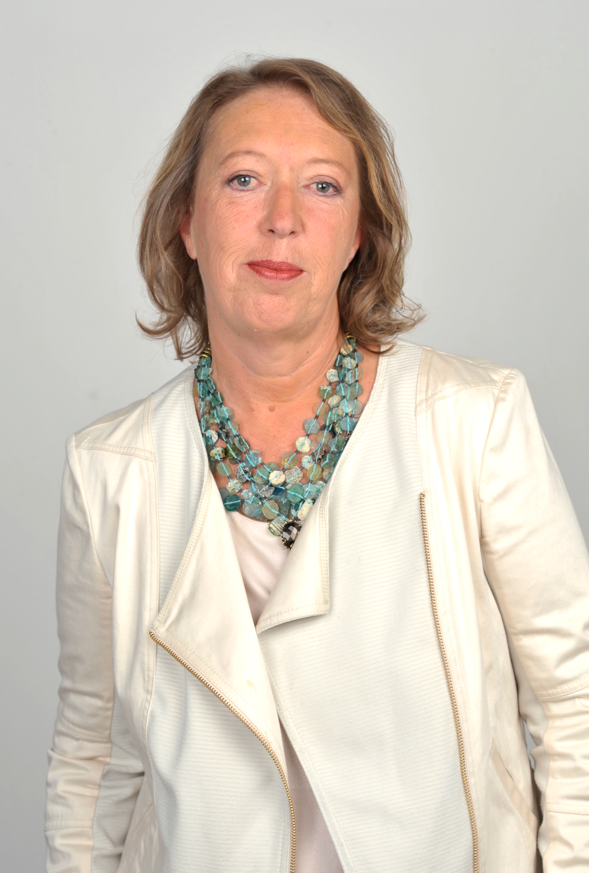 Fotoprojekt Österreichischer Film 2016: Kostümbildnerin Erika Navas